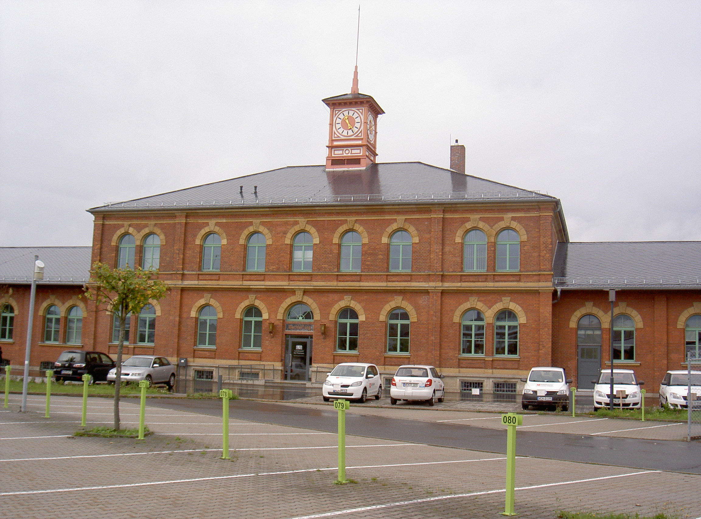 Verwaltungsgebäude des Eisenbahnausbesserungswerkes, Zur Centralwerkstätte 11 a (Weiden in der Oberpfalz)